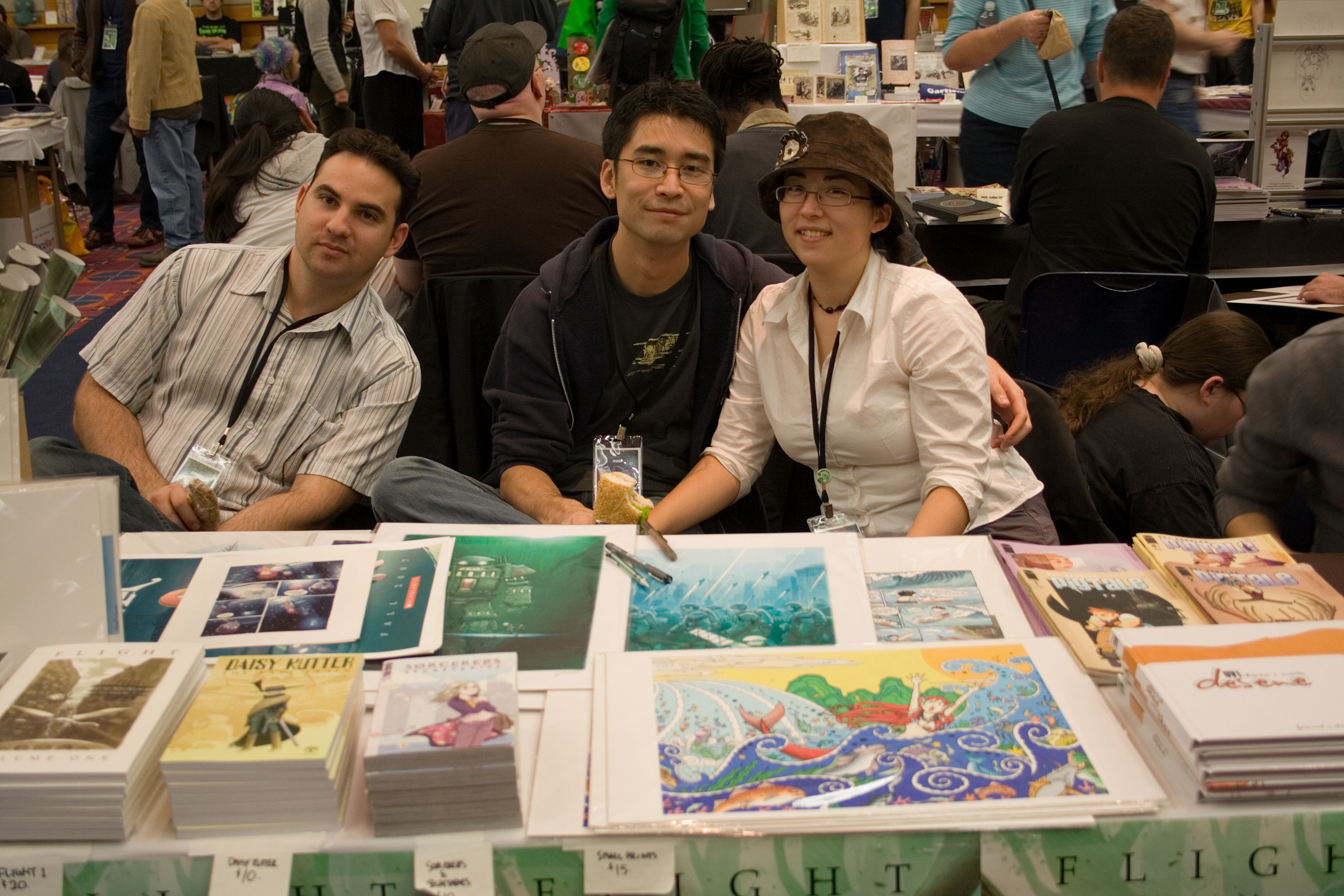 Ovi Nedelcu, Kazu Kibuishi and Amy Kim Ganter.